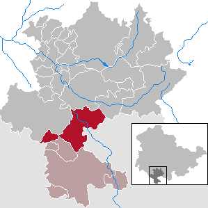 Straufhain in Thuringia - district Hildburghausen